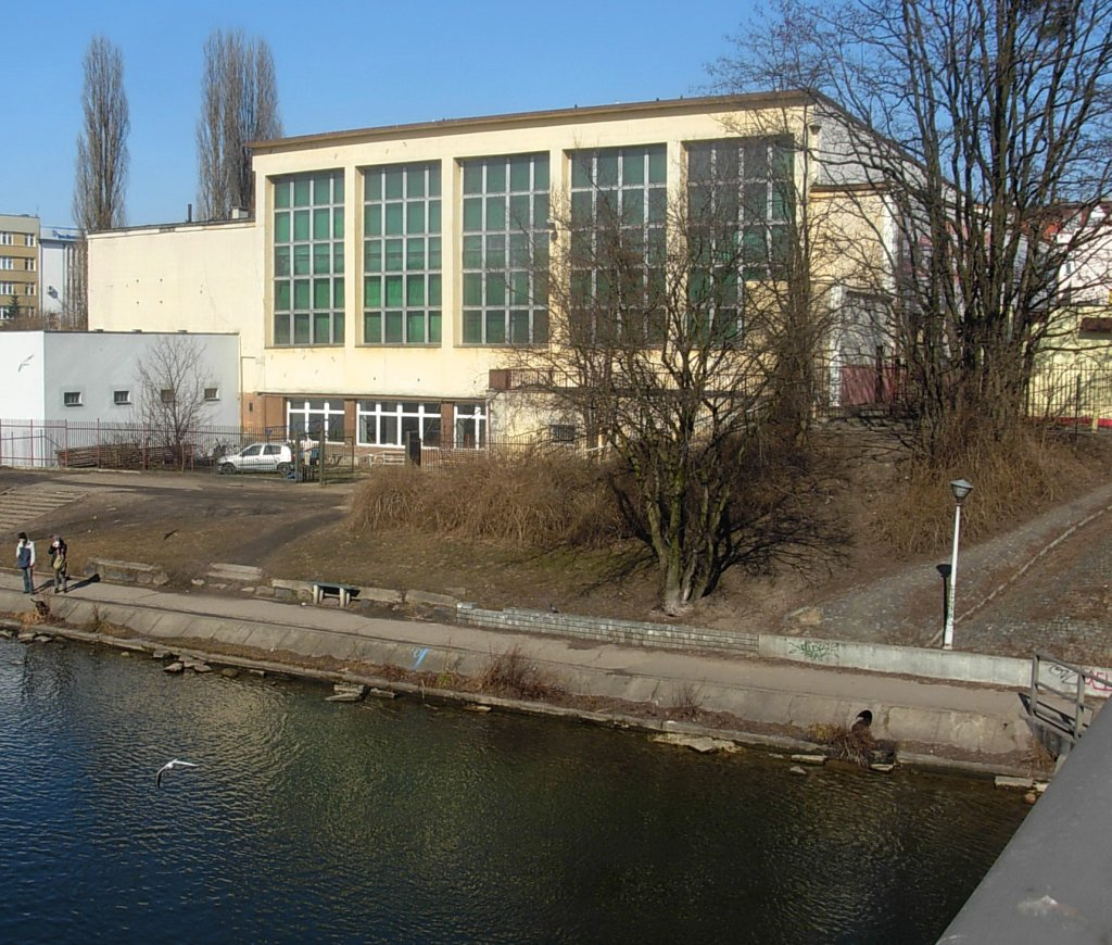 Hala Astoria w Bydgoszczy